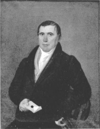 Bildnis des Christian August Jannowitz (1772–1839), Öl auf Leinwand, 75x60 cm, in der Triebeler Stadtkirche (1945 zerstört)